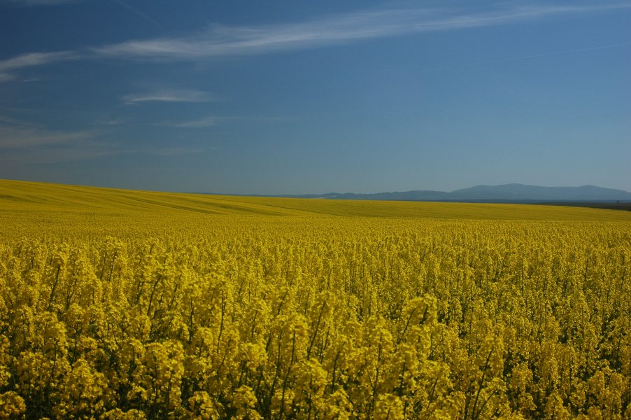 Chvojnica Hills (Chvojnická pahorkatina) near Unín